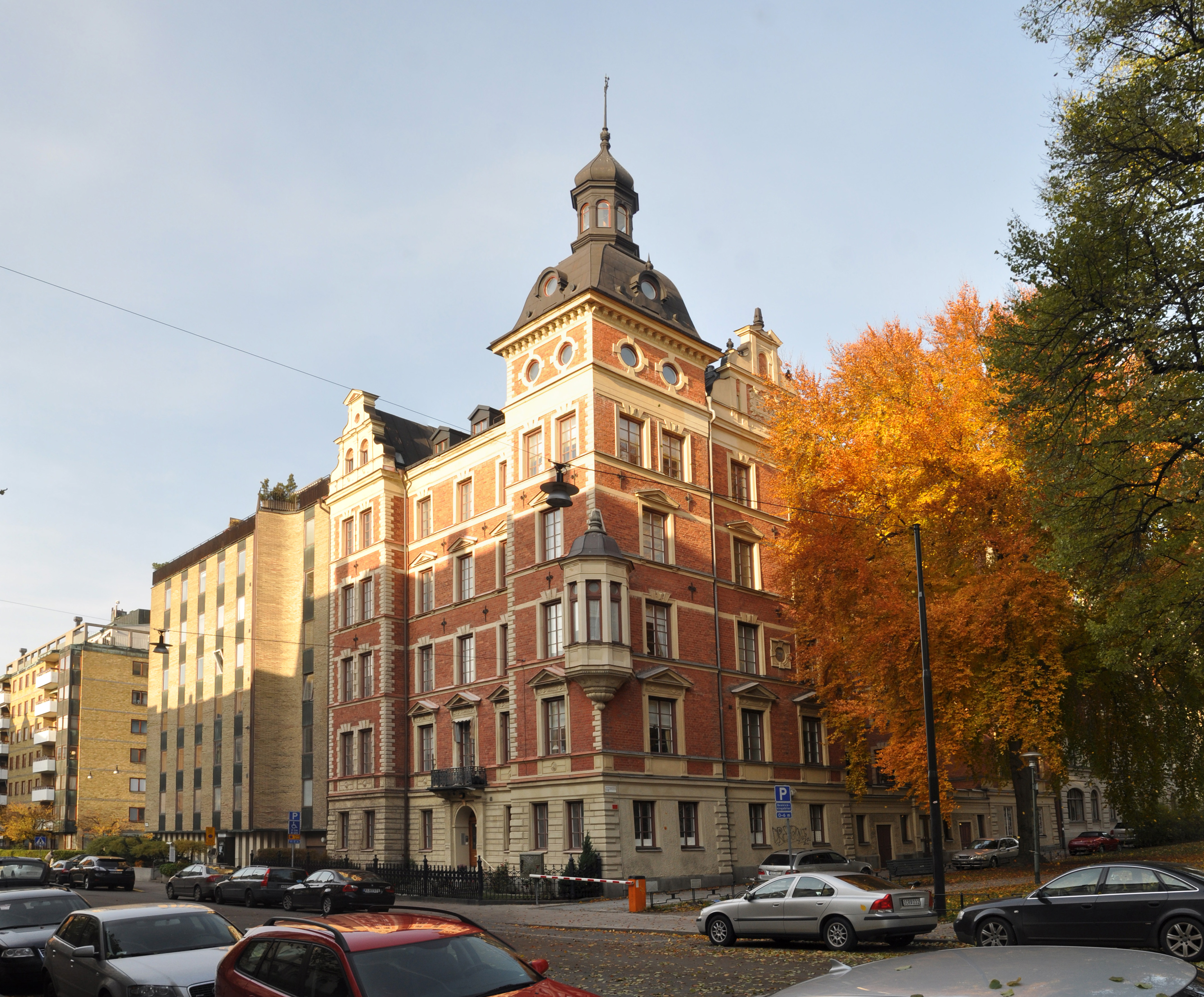 Östermalmsgatan 49, Stureparken 1. Byggnadsår 1883, Arkitekt Ferdinand Boberg efter utkast av Isak Gustaf Clason, , byggherre och byggmästare CM Söderlind & SA Sundblad